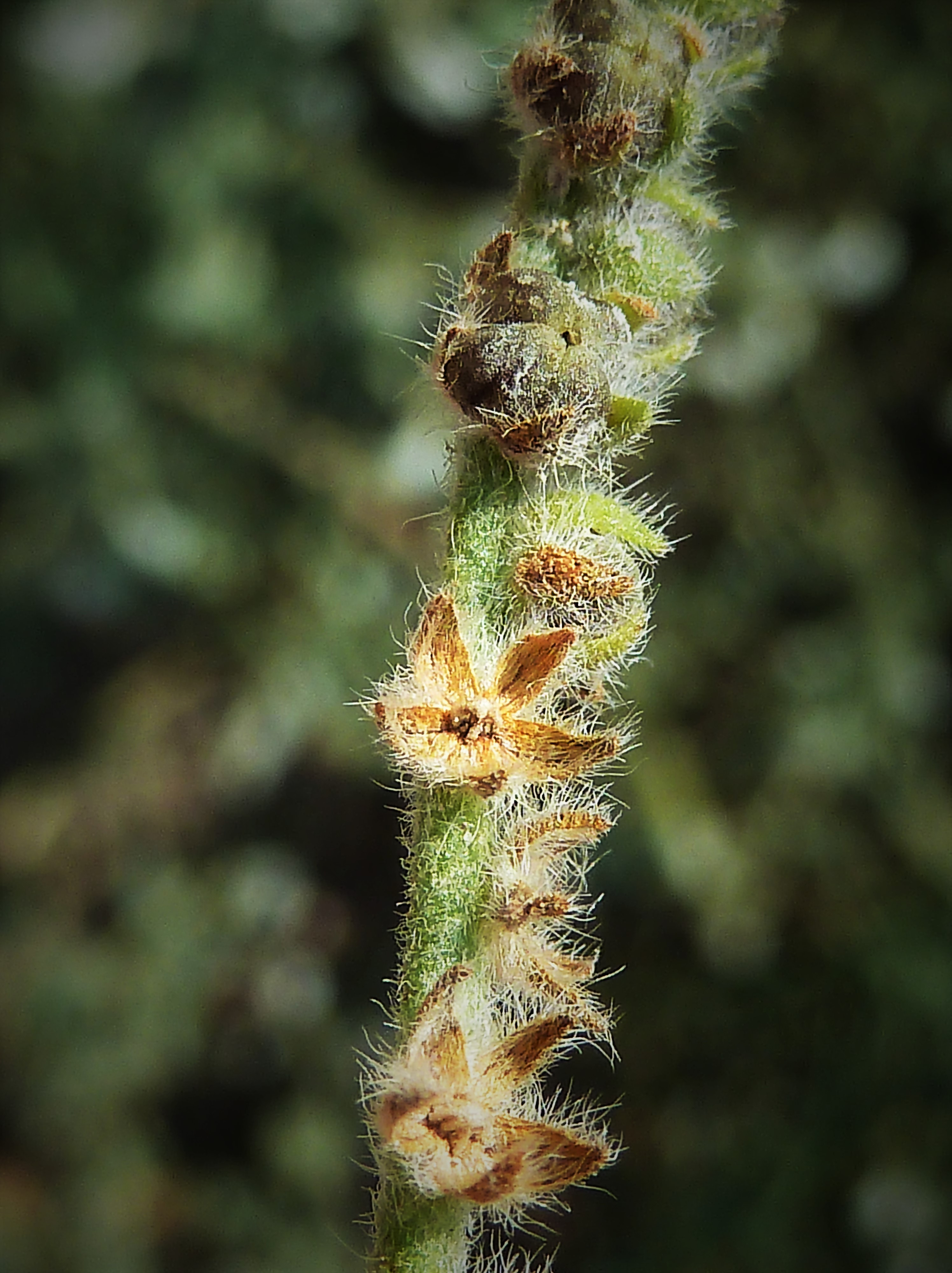 Heliotropium europaeum (Hierba verruguera, tornasol, verrucaria, ...) - Esquizocarpos de 4 mericarpos in situ y cálices postmaduración y caída de dichas clusas. - Descampado, calle del Compositor Manuel Berná García, Albatera (Provincia de Alicante, España).